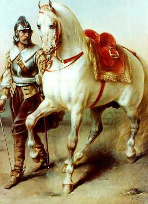 Cheval conduit par un homme d'armes